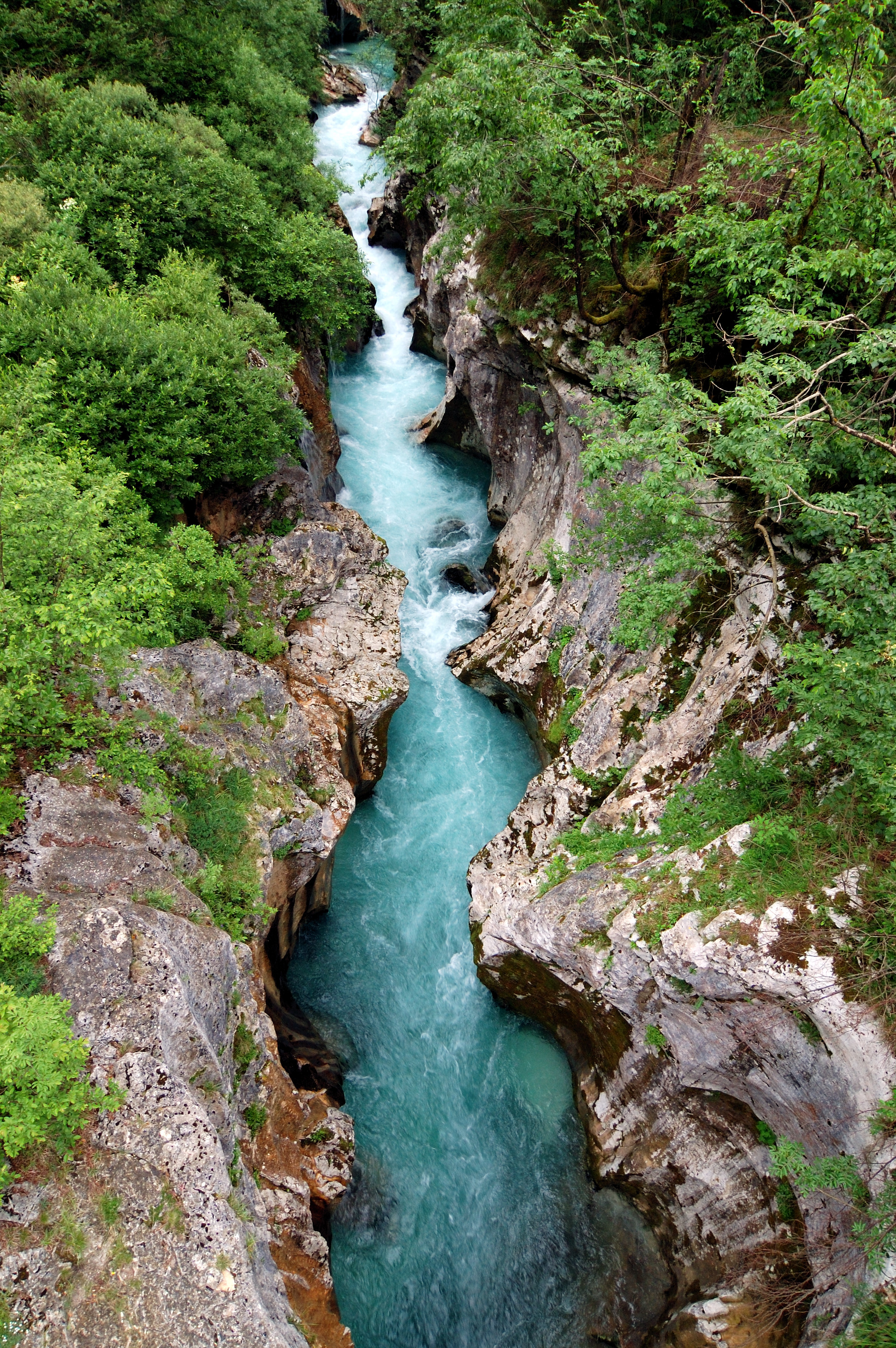 Soča river, Slovenia.